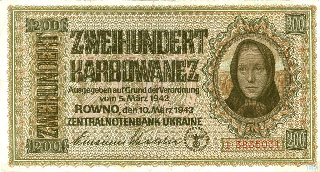 200 карбованцев Рейхскомиссариата Украина, Ровно, март 1942. аверс.